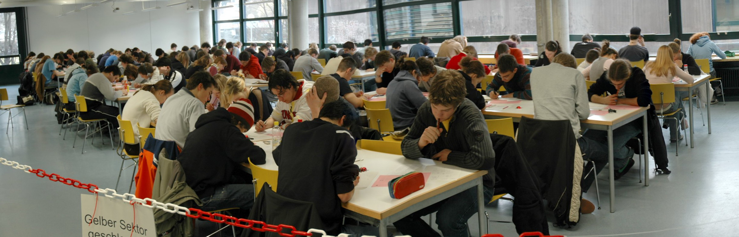 Das Bild zeigt die Stimmung, die während eines Kängurus der Mathematik 2006 herrschte